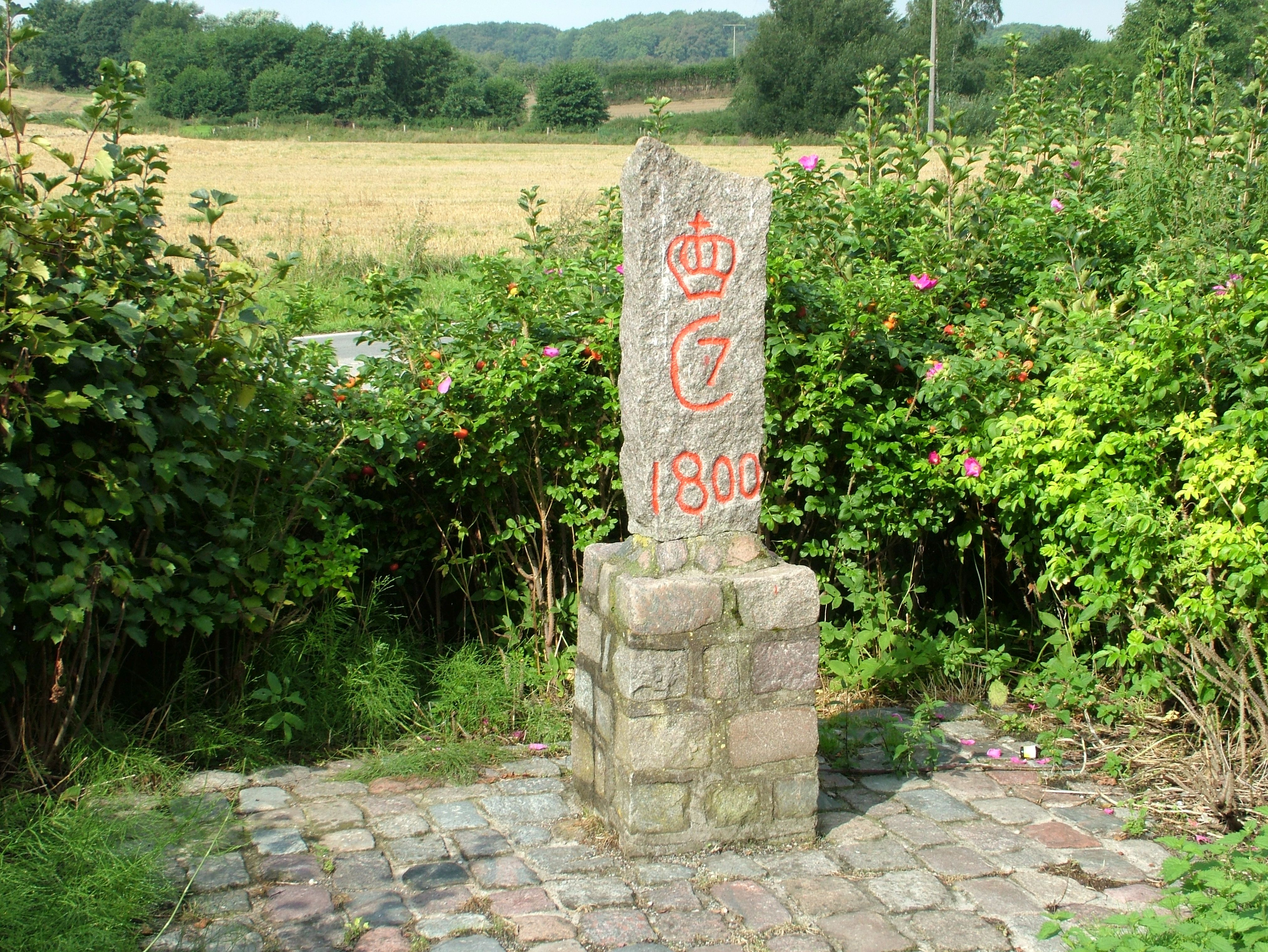 Rabenkirchen-Faulück. Ein Wegzeichen aus dem Jahr 1800.